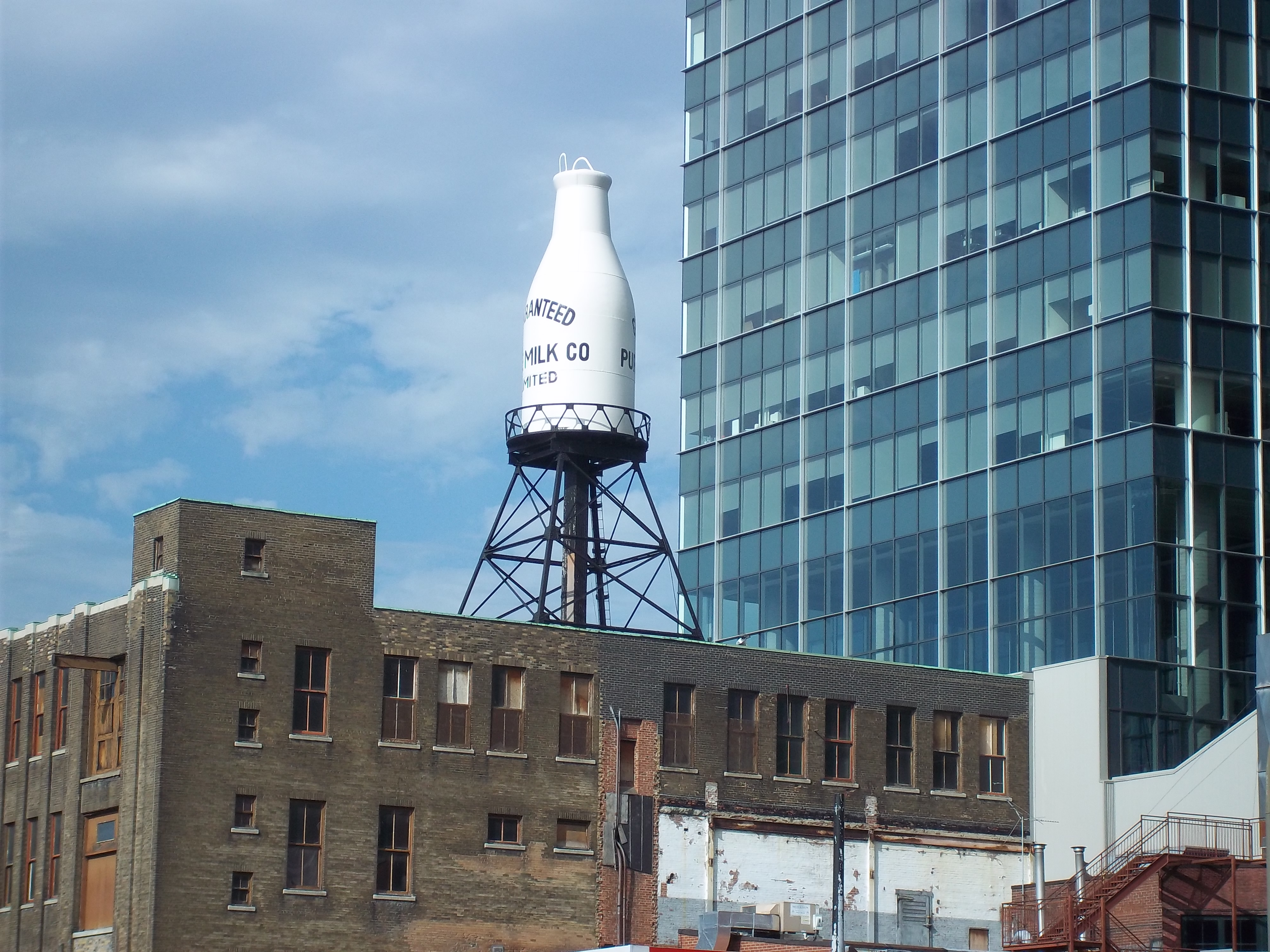 Pinte de lait Guaranteed Pure Milk Bottle, Montréal